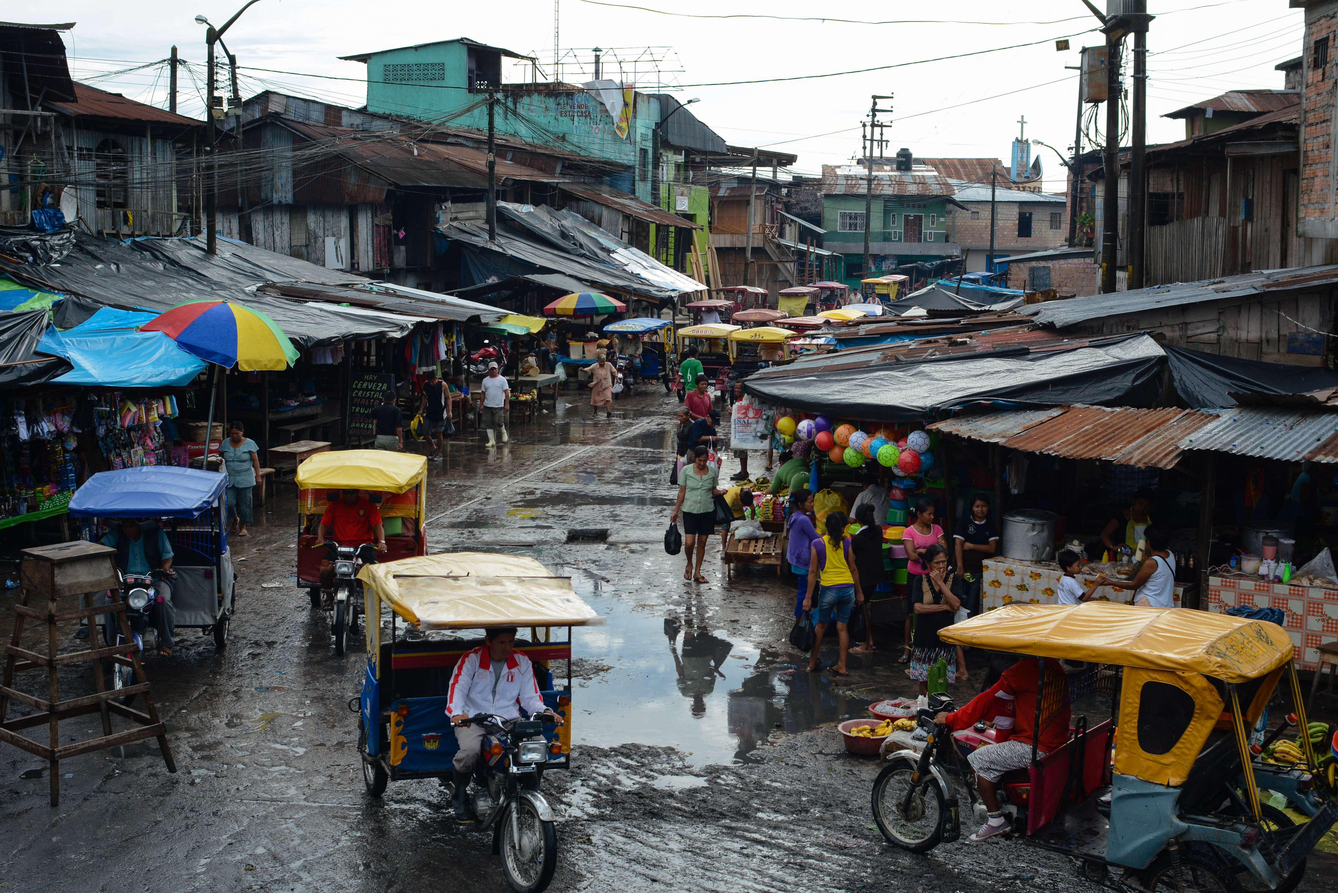 Belen, Iquitos